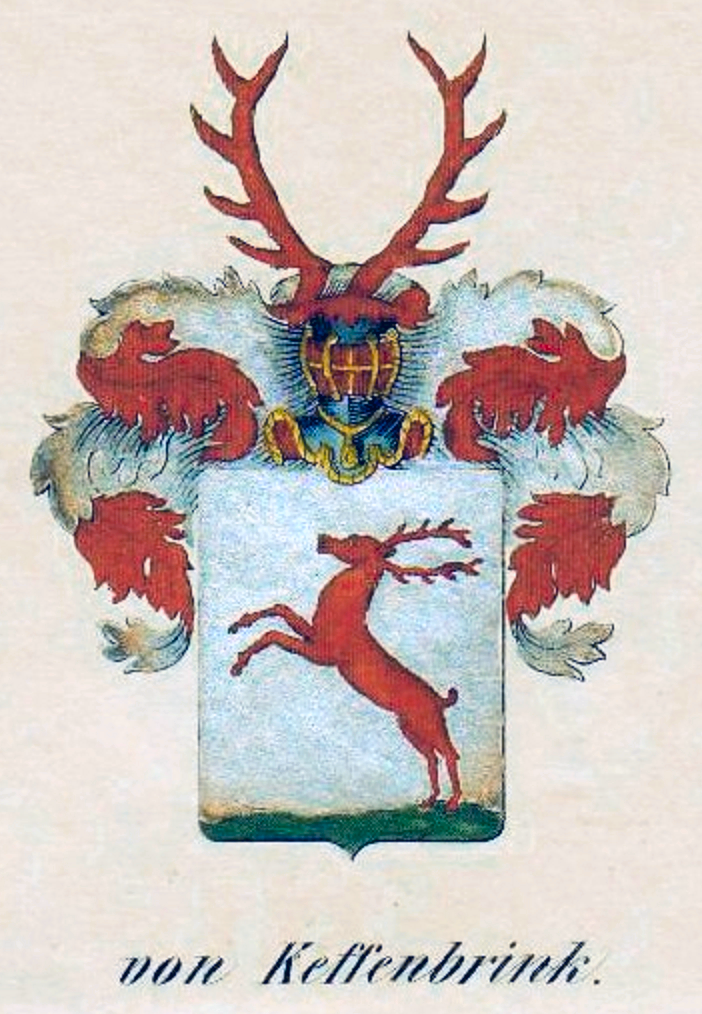 Wappen der von Keffenbrink (Keffenbrinck), auch Kewenbrinck oder Keffenbrinck von Rhene, sowie in einer Nebenlinie auch Rehnskiöld, eines ursprünglichen rheinländischen, erloschenen pommersch-schwedisch-preußischen Adelsgeschlechts.